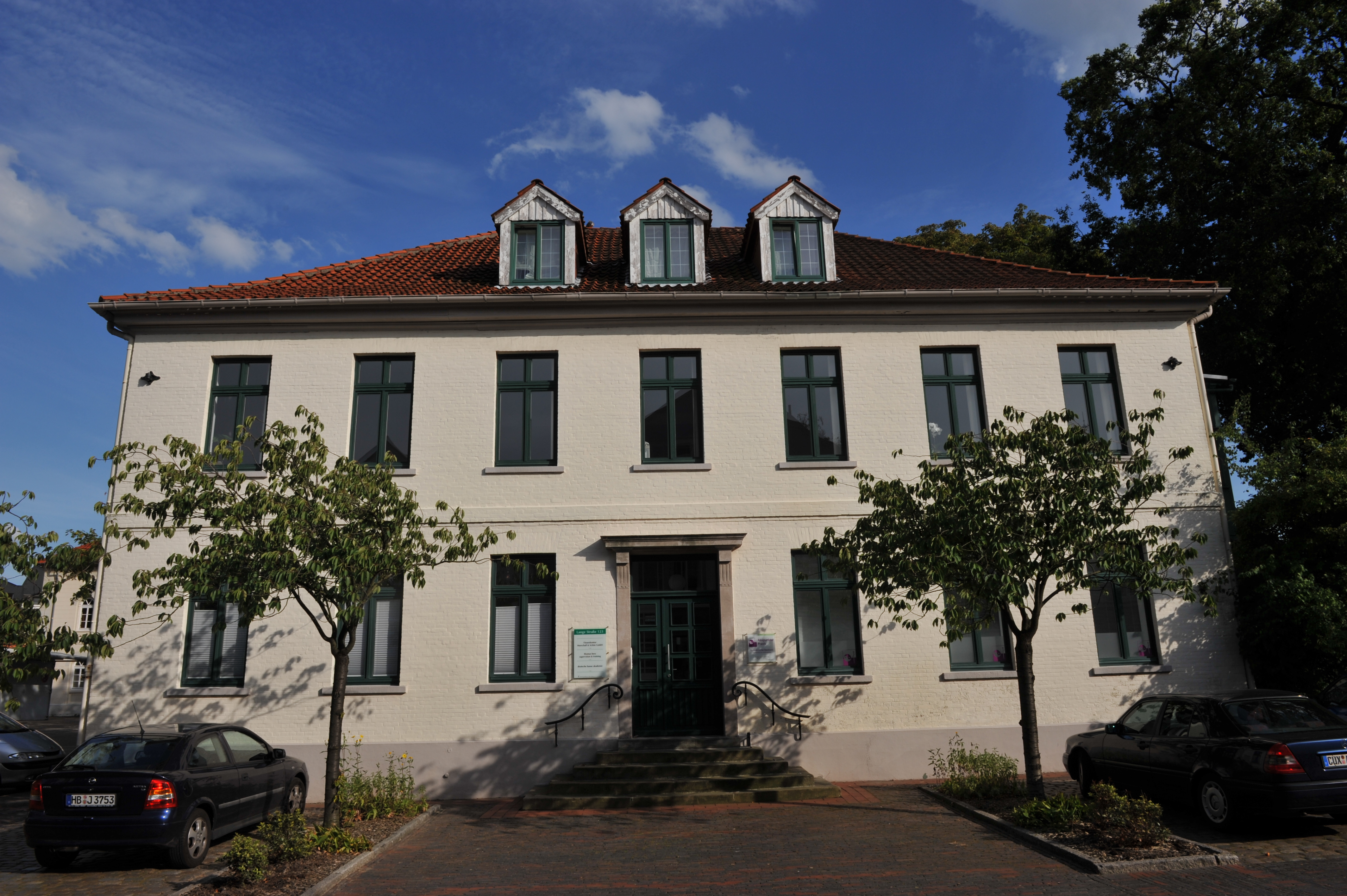 Historical building in Bremerhaven, northern Germany Wohnhaus für den ersten Leher Amtmann, Lange Straße 123, erbaut 1830 Das abgebildete Objekt ist ein geschütztes Kulturdenkmal in der Freien Hansestadt Bremen, mit der Nr. 1578 beim Landesamt für Denkmalpflege registriert.